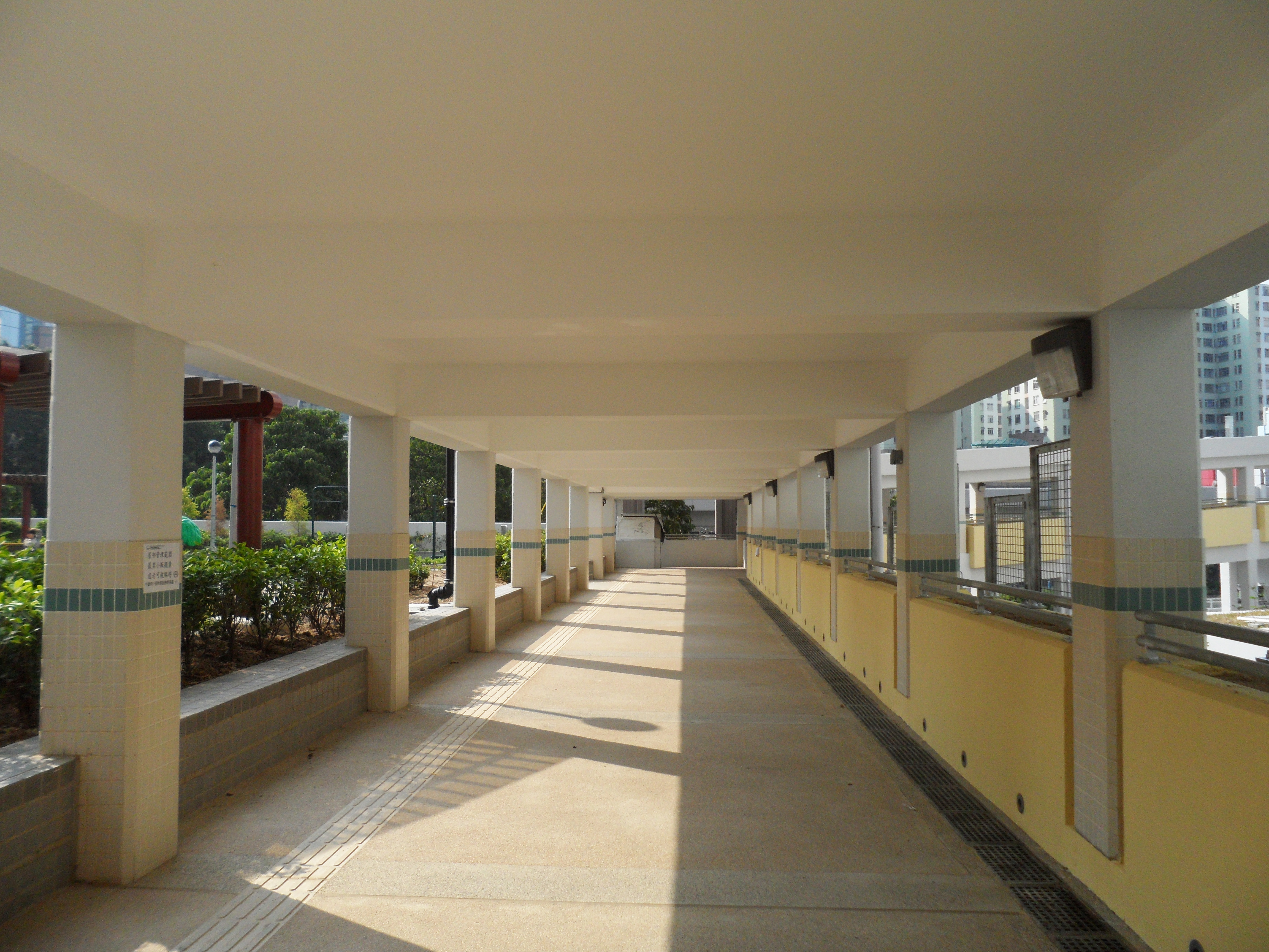 牛頭角下邨通往港鐵車站行人天橋